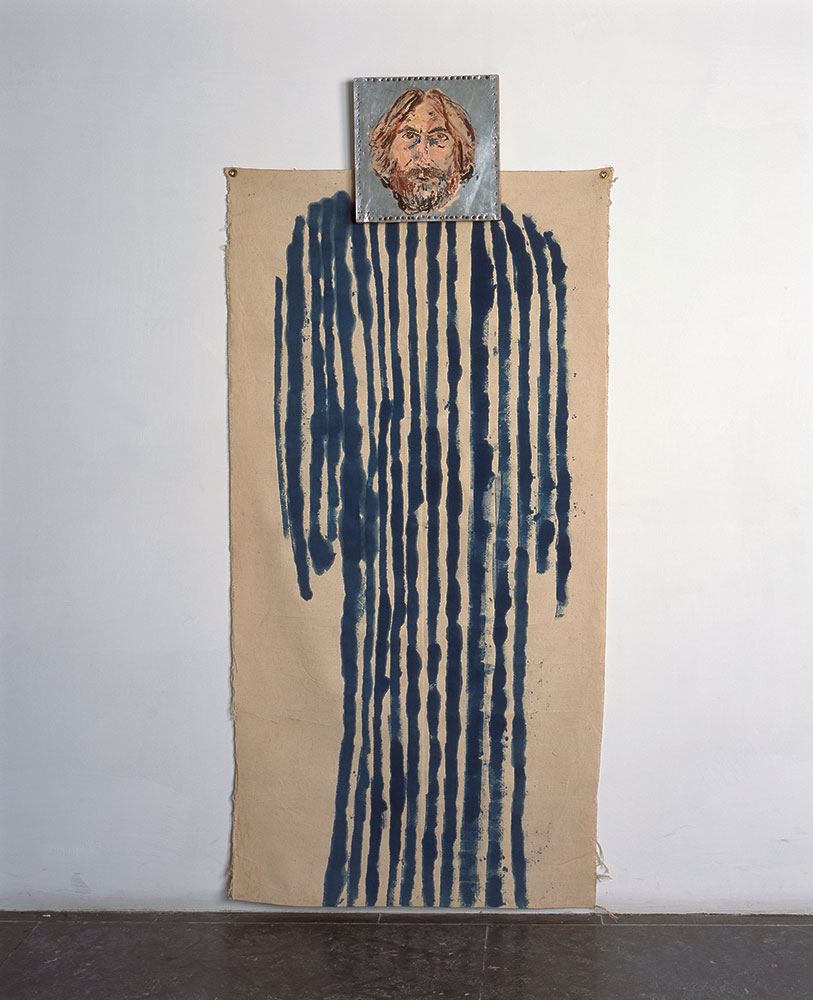 כתנת פסים (1981), אקריליק עד בד רפוי ועל פח, 71x177 ס״מ, אוסף מוזיאון ישראל, ירושלים